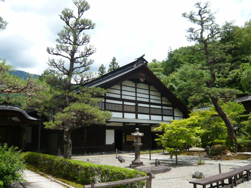 定勝寺本堂